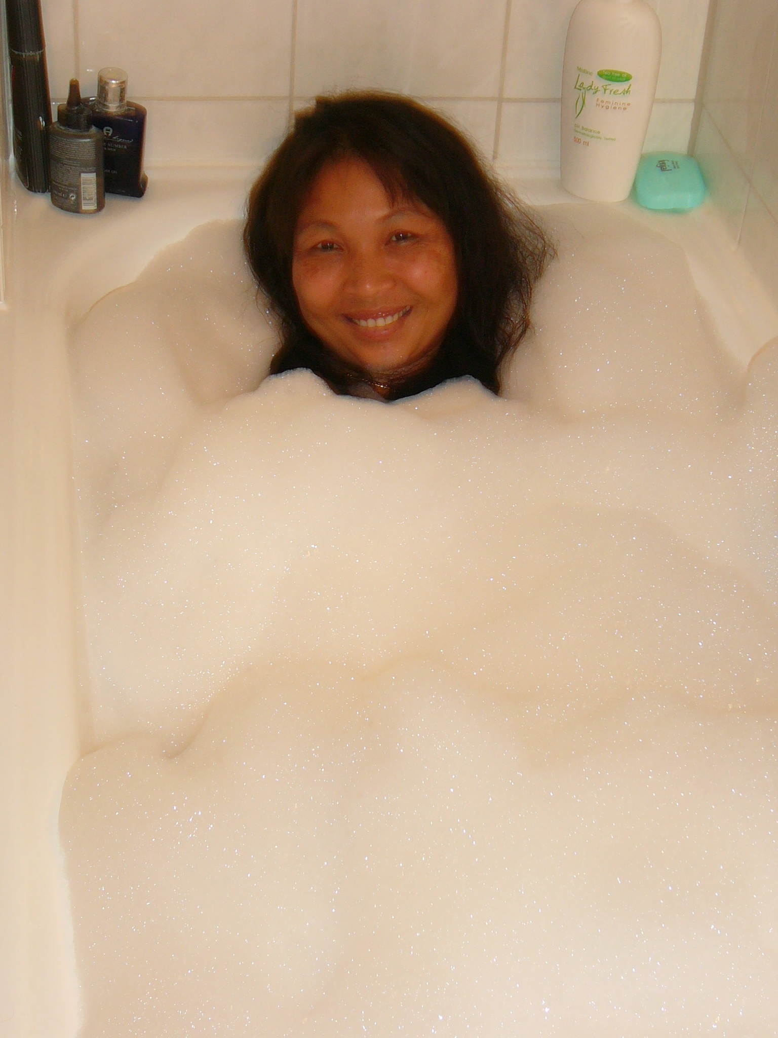 Schaumbad meiner Frau